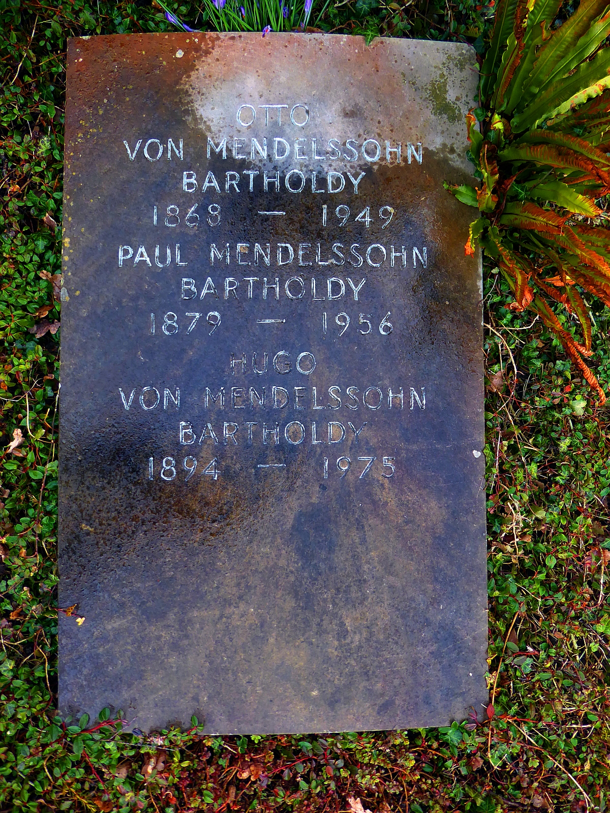 Otto von Mendelssohn Bartholdy -Bartholdy (1868–1949) Bankier, Industrieller, Agfa- Anilin und Anilinfarben, IG Farben, Grab auf dem Friedhof Hörnli, Riehen, Basel-Stadt